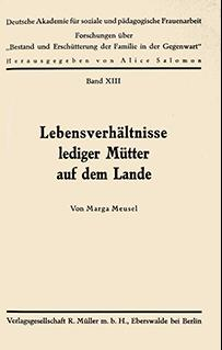 Buch Lebensverhältnisse...